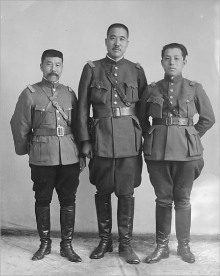 张学良与张宗昌(中)和褚玉璞(左)